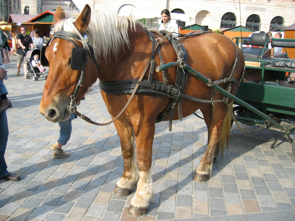 Cheval de race " comtois " - Franche-Comté - France